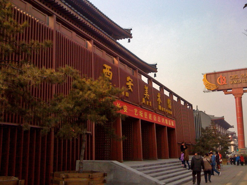 西安美术馆，位于曲江新区。